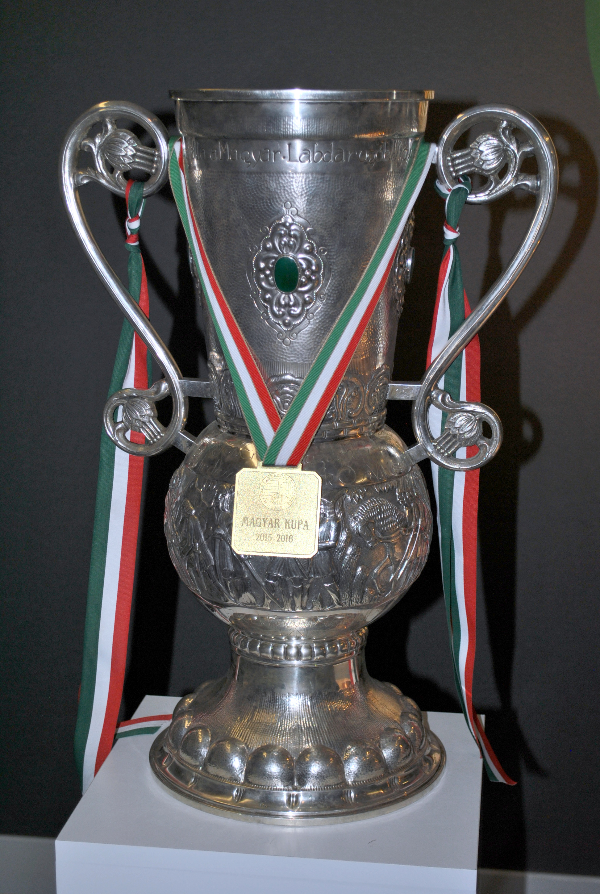 Magyar labdarúgókupa